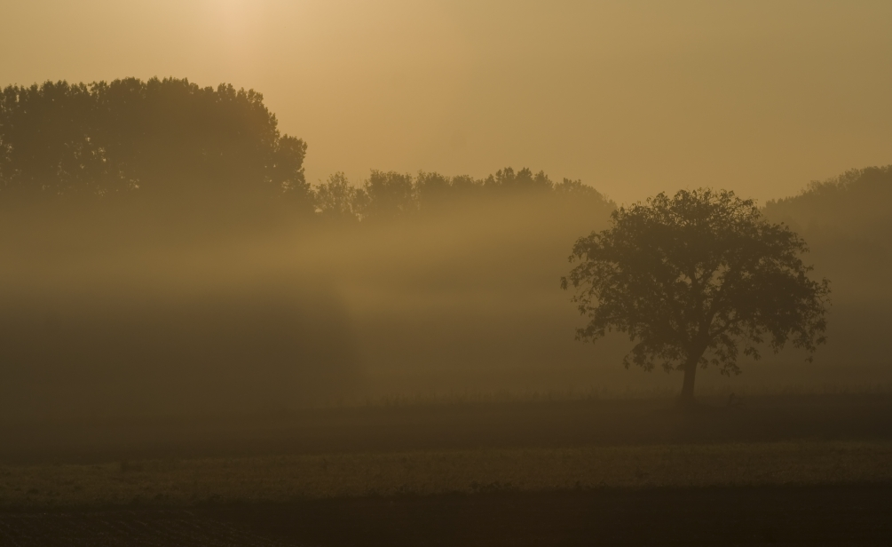 Morgen bei Barbelroth